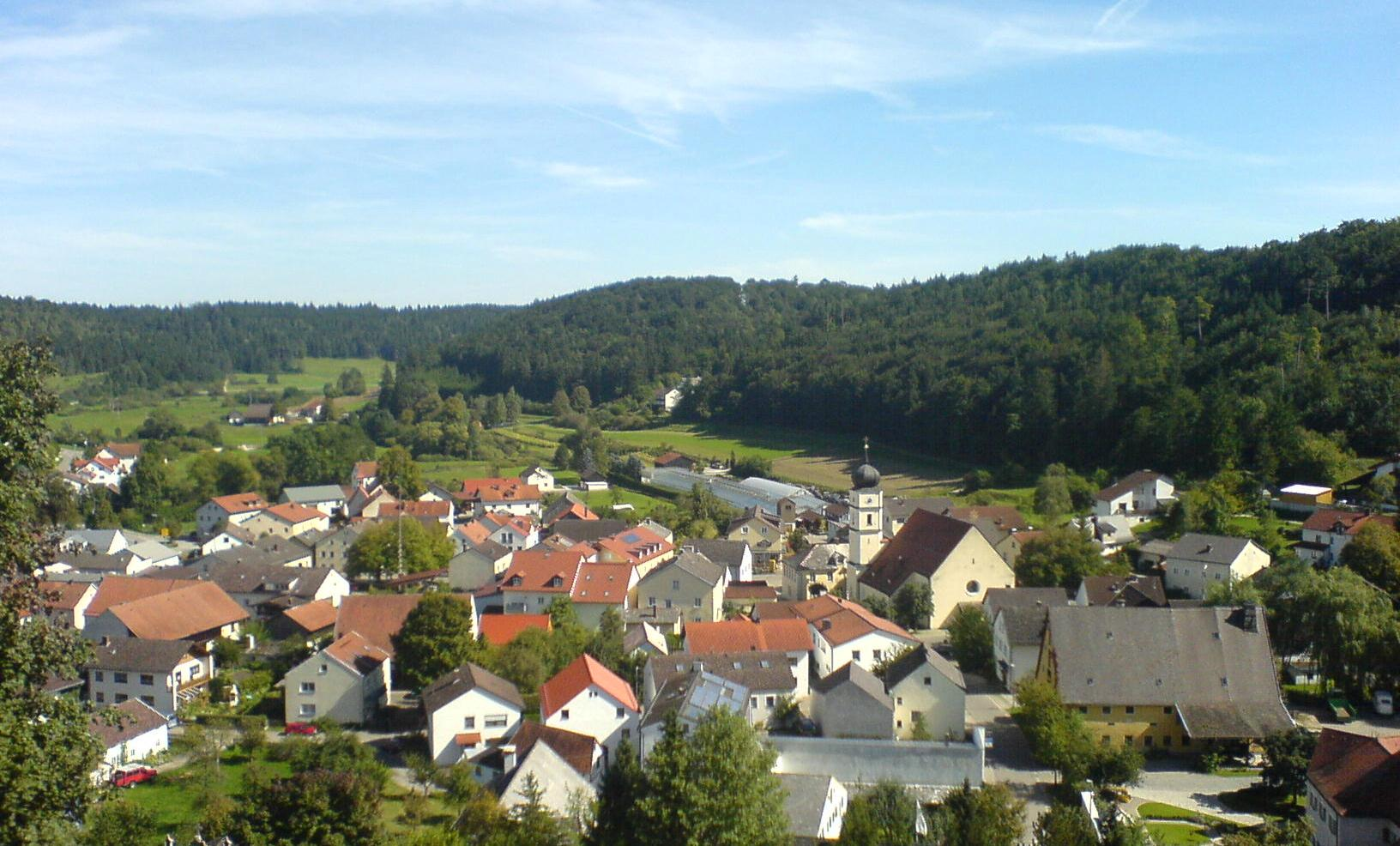 Blick auf den Markt Titting (Oberbayern) vom Kreuzberg.